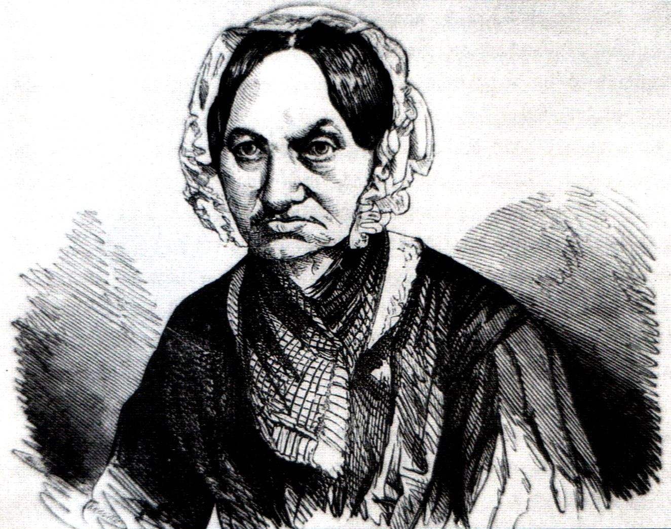 Anna Lühring, kämpfte als Mann verkleidet in den Befreiungskriegen gegen Napoleon